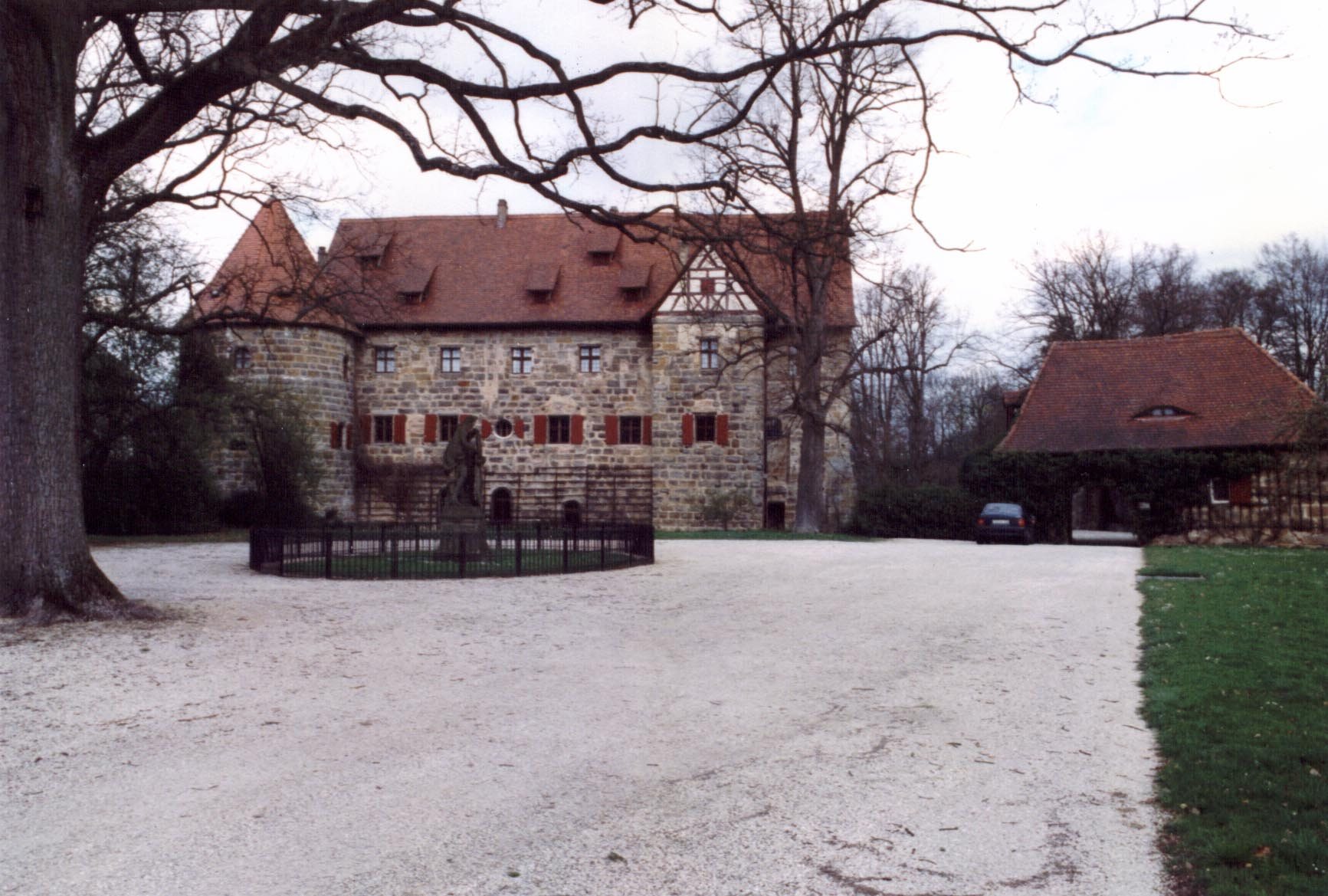 Schloss Kunreuth, Südflügel